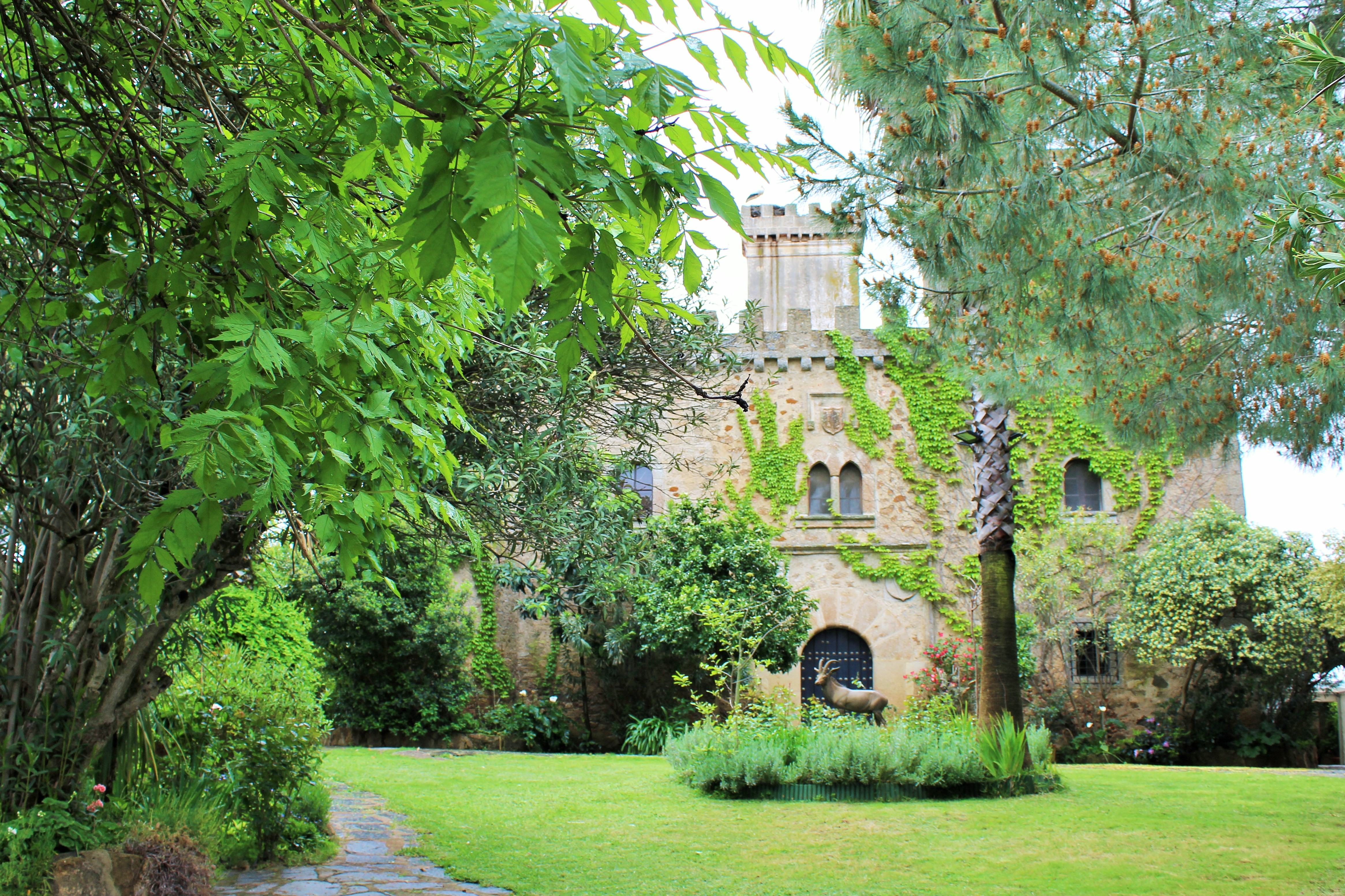 Castillo convertido en lugar de eventos. A unos 10 km. de Cáceres